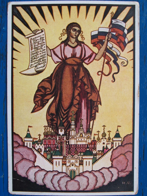 Carte postale d'Ivan Bilibine. Edition du "Bureau pédagogique de Prague" pour la "Journée de la culture russe".